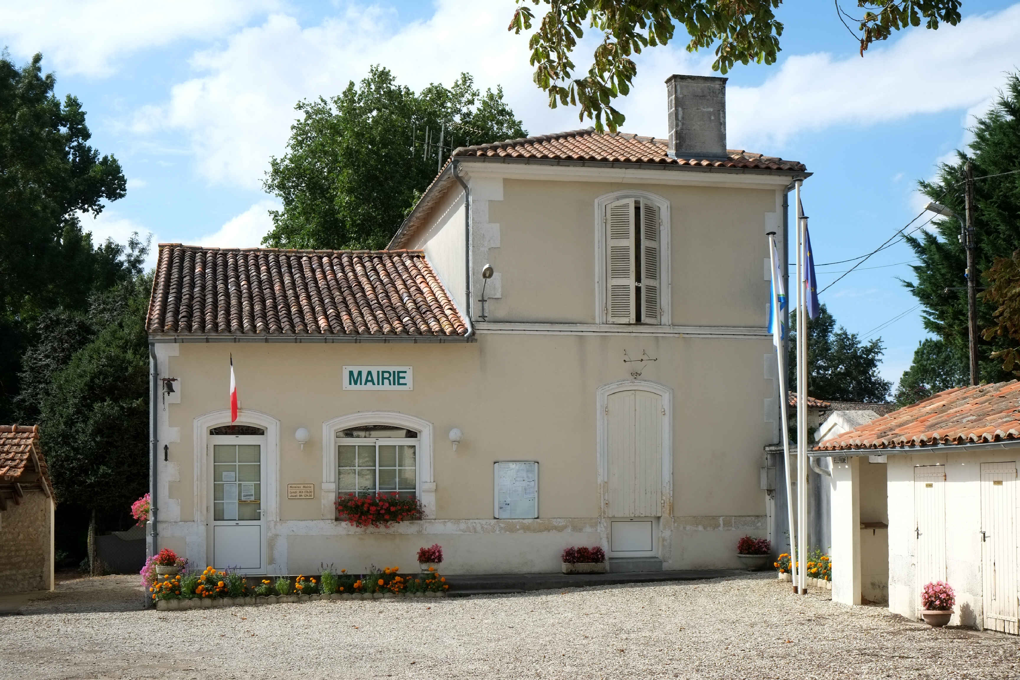 Mairie Bazauges Charente-Maritime france